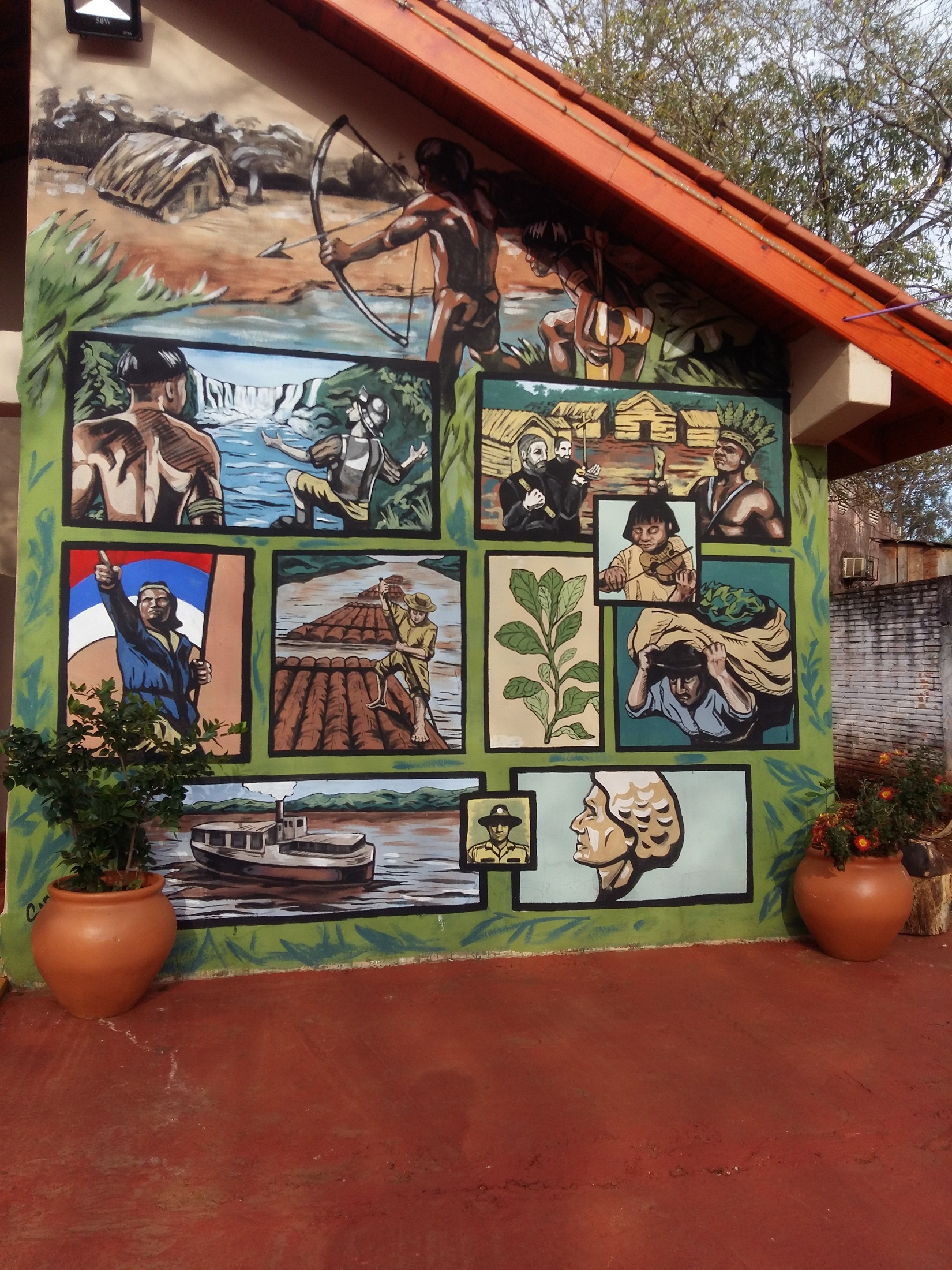 Este mural se titula ´1000 años de historia. fue realizado por la artista plástica española Sara Choliz, quien retrata una serie de hechos que reflejan lo mas destacado de la historia de las Cataratas, como la llegada de Alvar Nuñez Cabeza de Vaca a las Cataratas. la comunidad mbya guaraní y los asentamientos típicos de las reducciones . El trabajo con nuestros productos típicos, homenaje a los músicos de la ciudad, etc.Mural